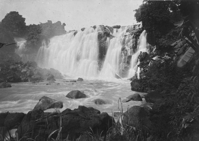 Foto. Waterval in de Tuntang-rivier bij Salatiga